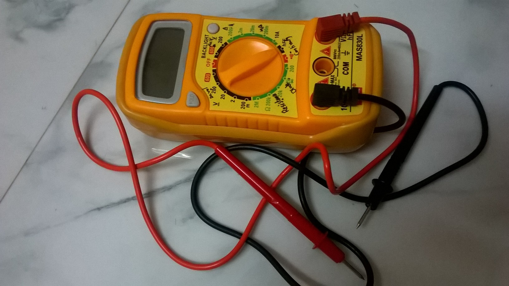 ఎలక్ట్రానిక్ మల్టీ మీటరు